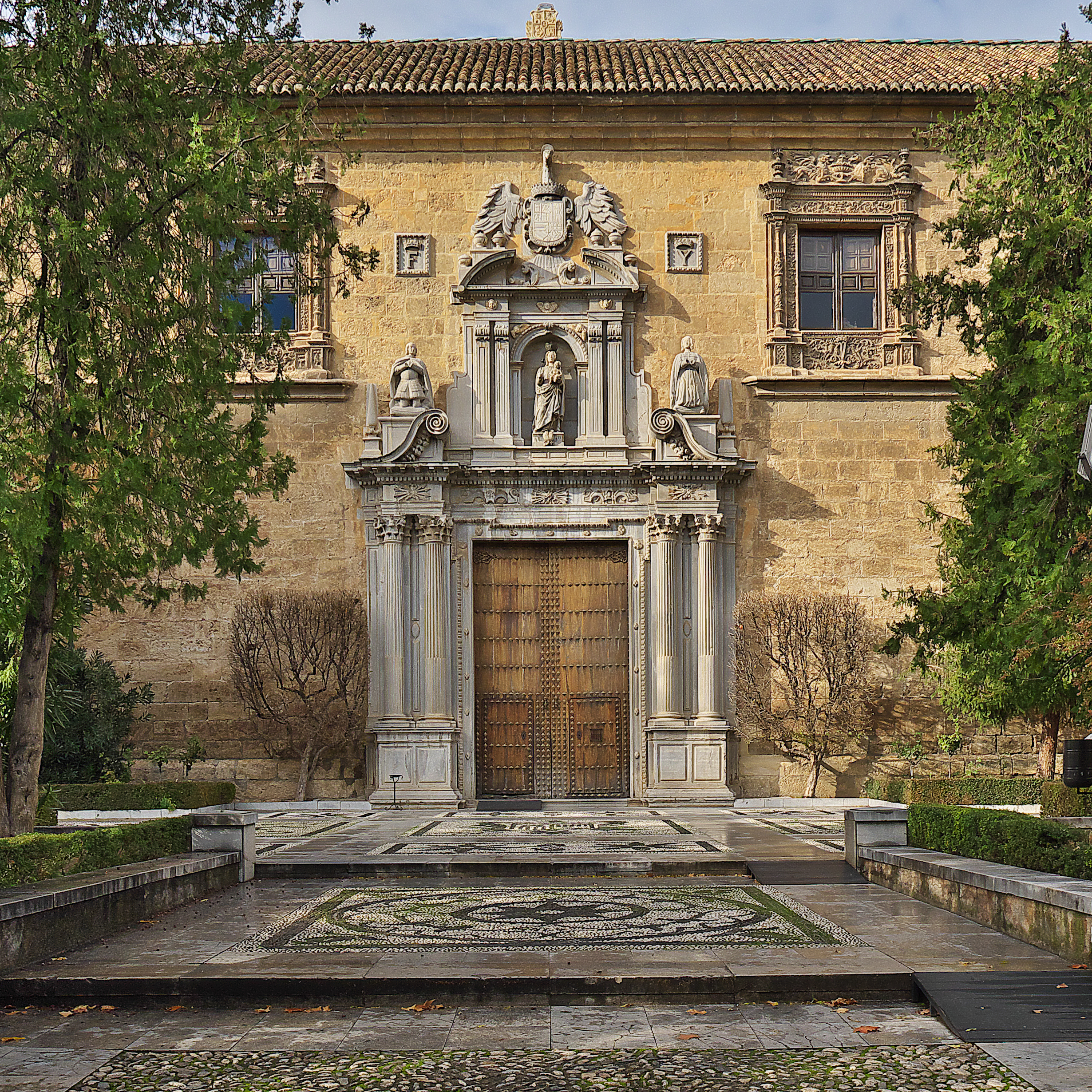 Última fase constructiva del edificio. Alonso de Mena realiza una armoniosa portada barroca en la fábrica renacentista (1632-1640)